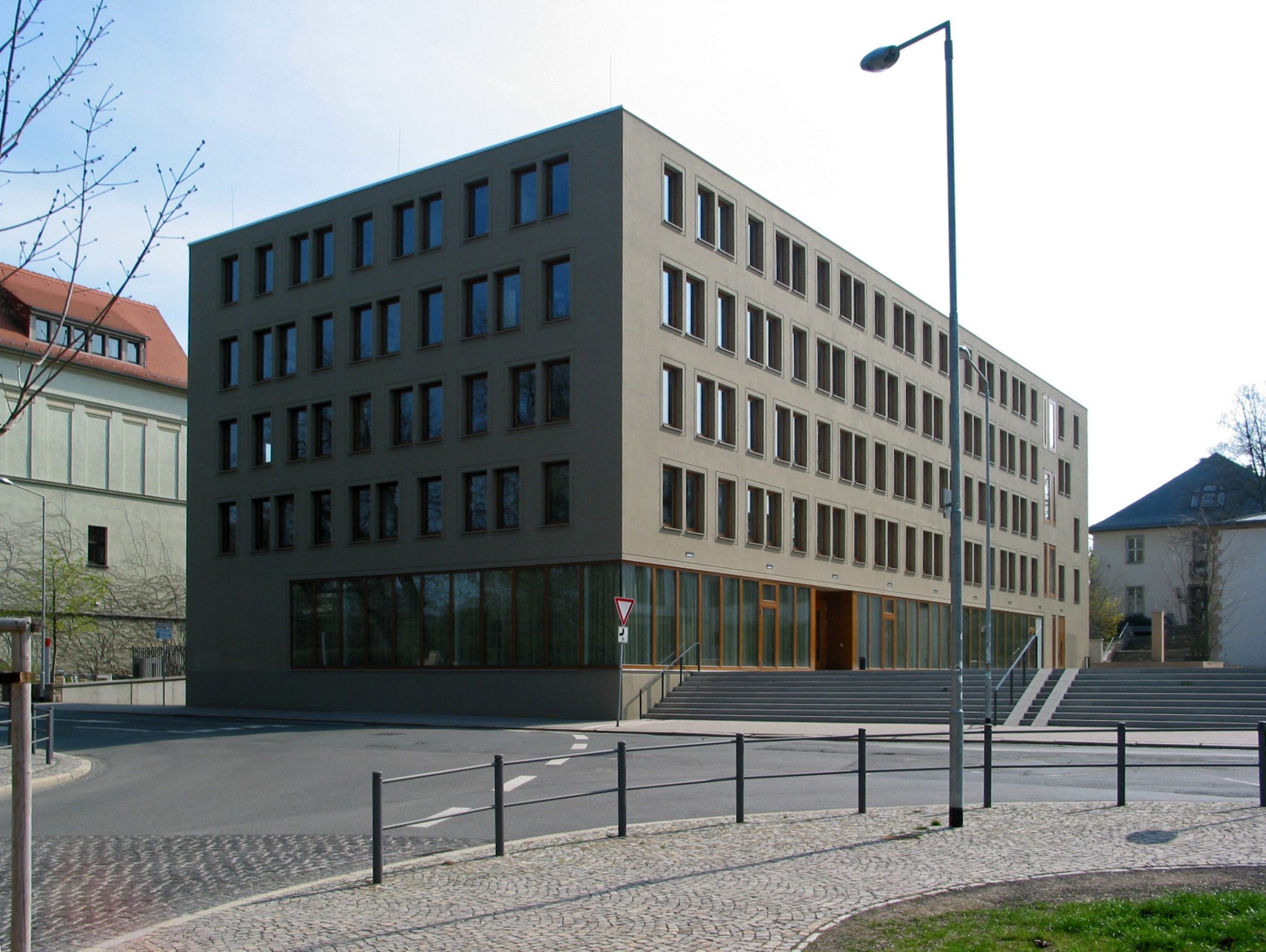 Der Erweiterungsneubau der Stadtverwaltung Weimar in der Schwanseestraße. Geplant vom Büro ReimarHerbst.Architekten BDA. Fertiggestellt 2009.